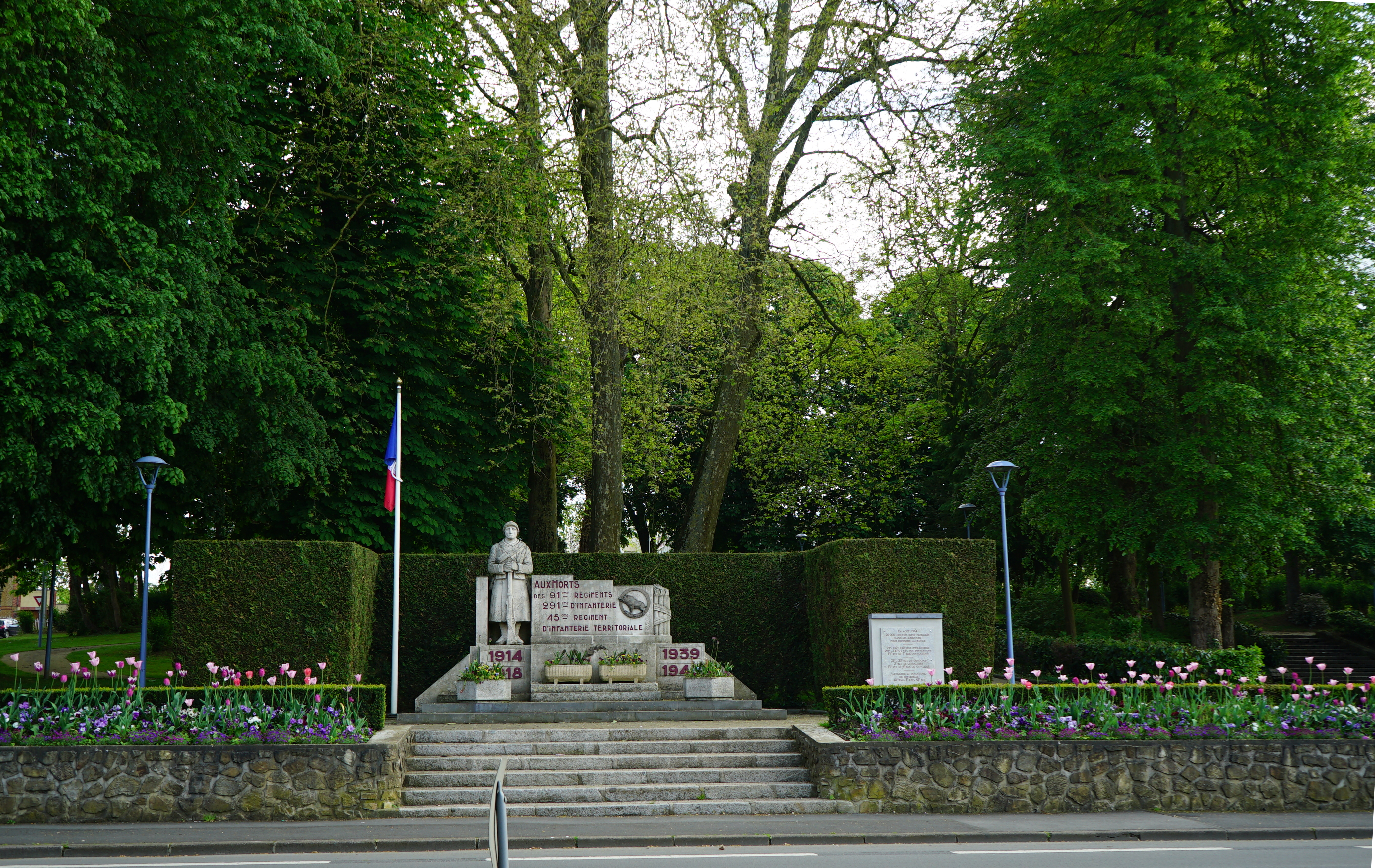 une vue des régiments ardennais.